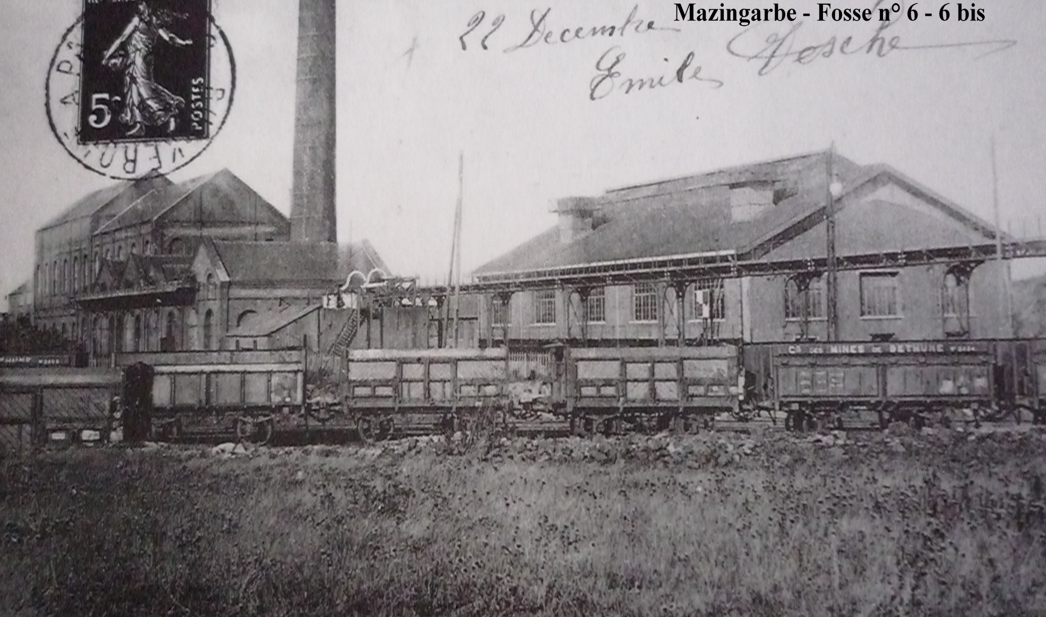 La fosse n° 6 - 6 bis de la Compagnie des mines de Béthune était un charbonnage du bassin minier du Nord-Pas-de-Calais constitué de deux puits situé à Mazingarbe, Pas-de-Calais, Nord-Pas-de-Calais, France.